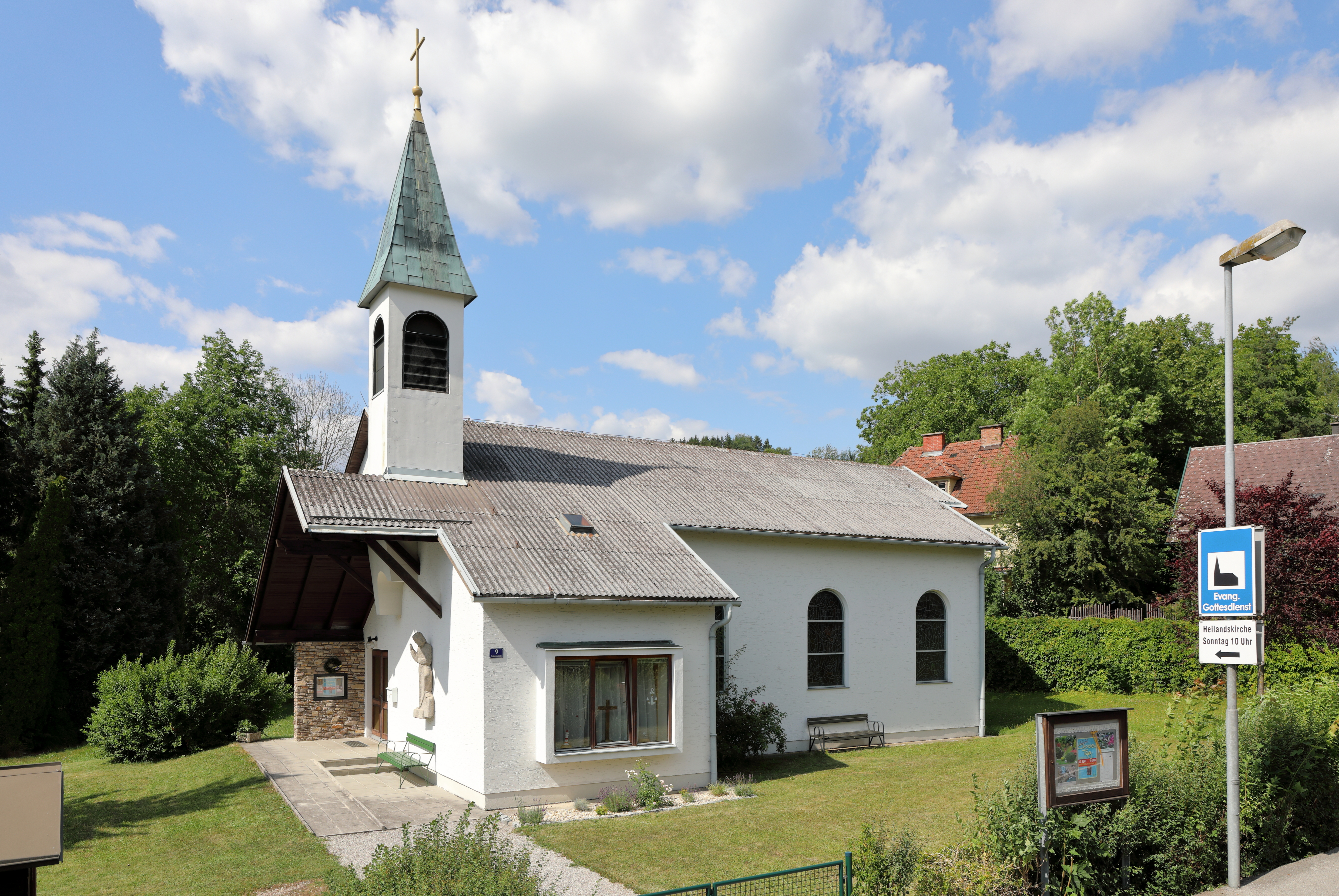 Südsüdwestansicht der evangelischen Pfarrkirche in der niederösterreichischen Stadtgemeinde Scheibbs.Die Heilandskirche wurde nach Plänen des Scheibbser Architekten Oskar Scholz ab 1964 errichtet (Grundsteinlegung am 5. Juli 1964) und am 25. August 1968 durch den Bischof der Evangelischen Kirche Dr. Gerhard May eingeweiht. Die Buntglasfenster gestaltete der Wiener Akademieprofessor Günther Baszel.